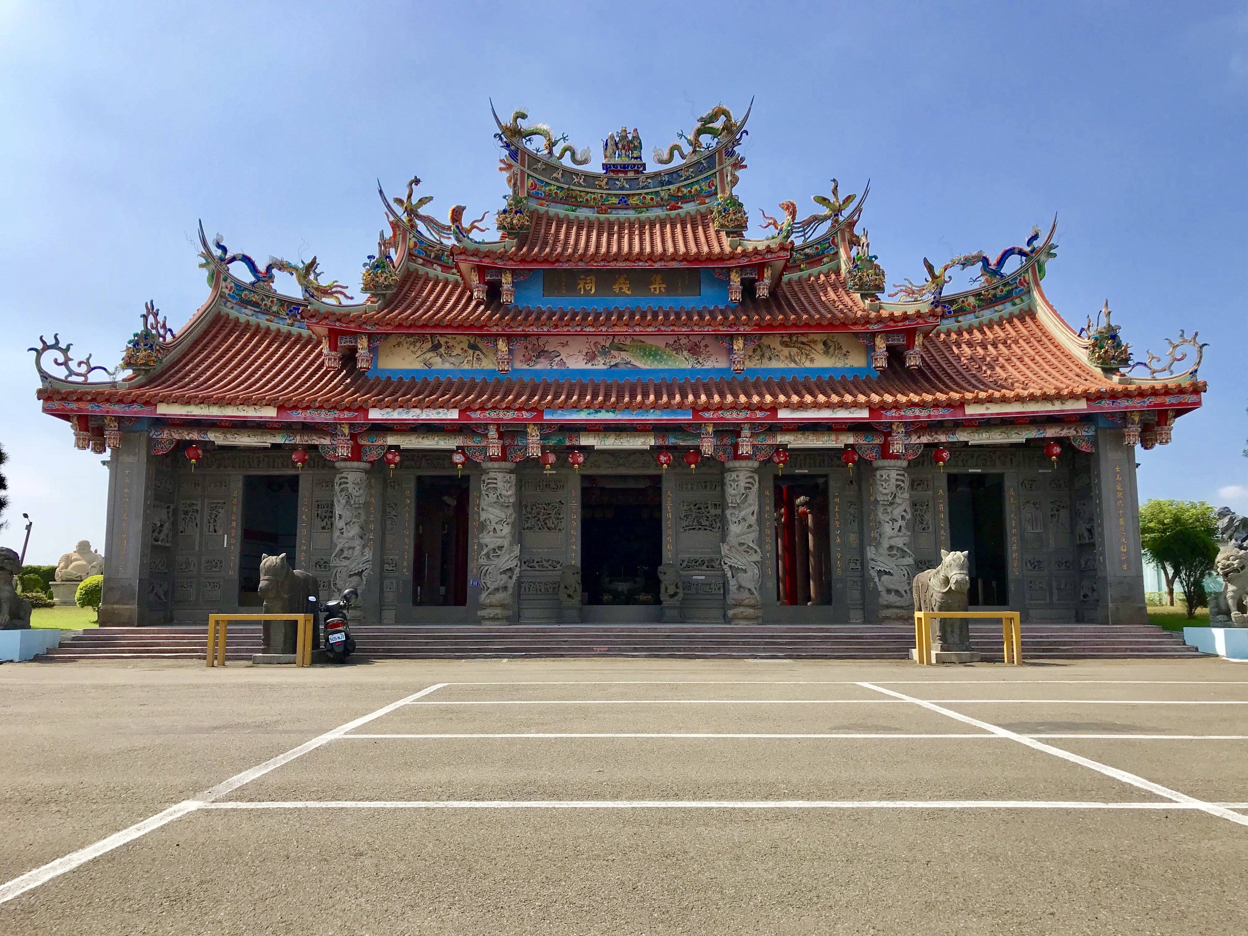 集義祠正面照